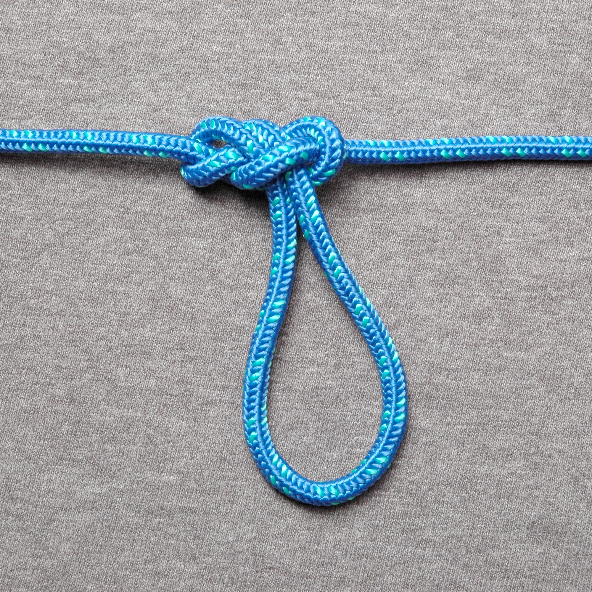 Span loop (ABOK #1049)